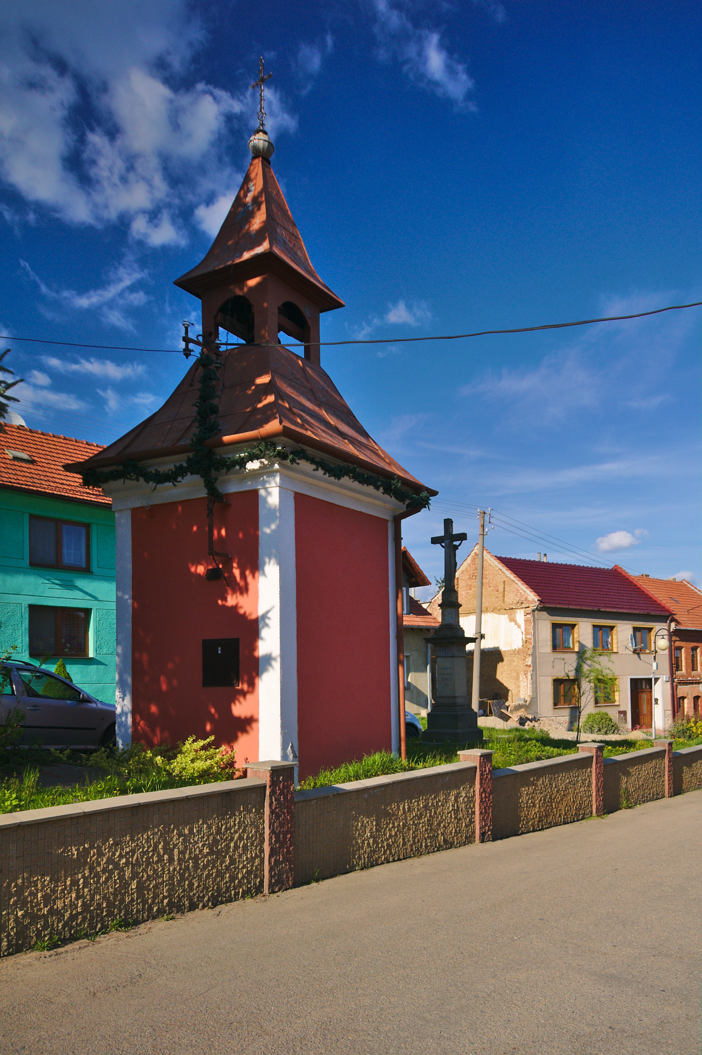 Zvonice, Ondratice, okres Prostějov